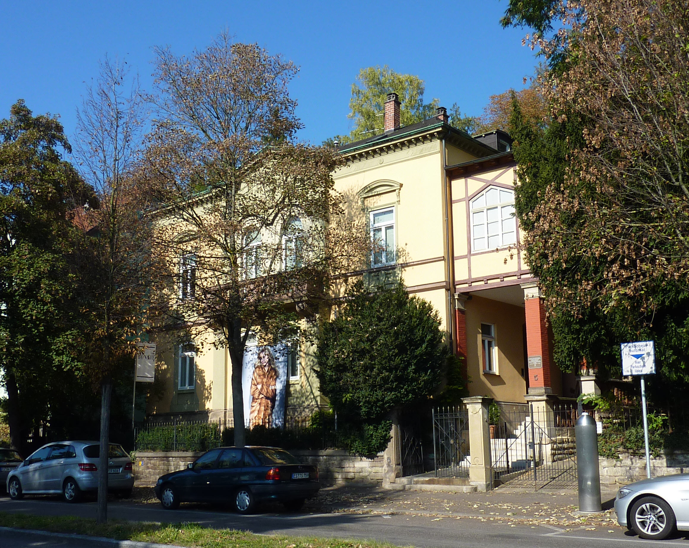 Ebershaldenstraße 5, Esslingen